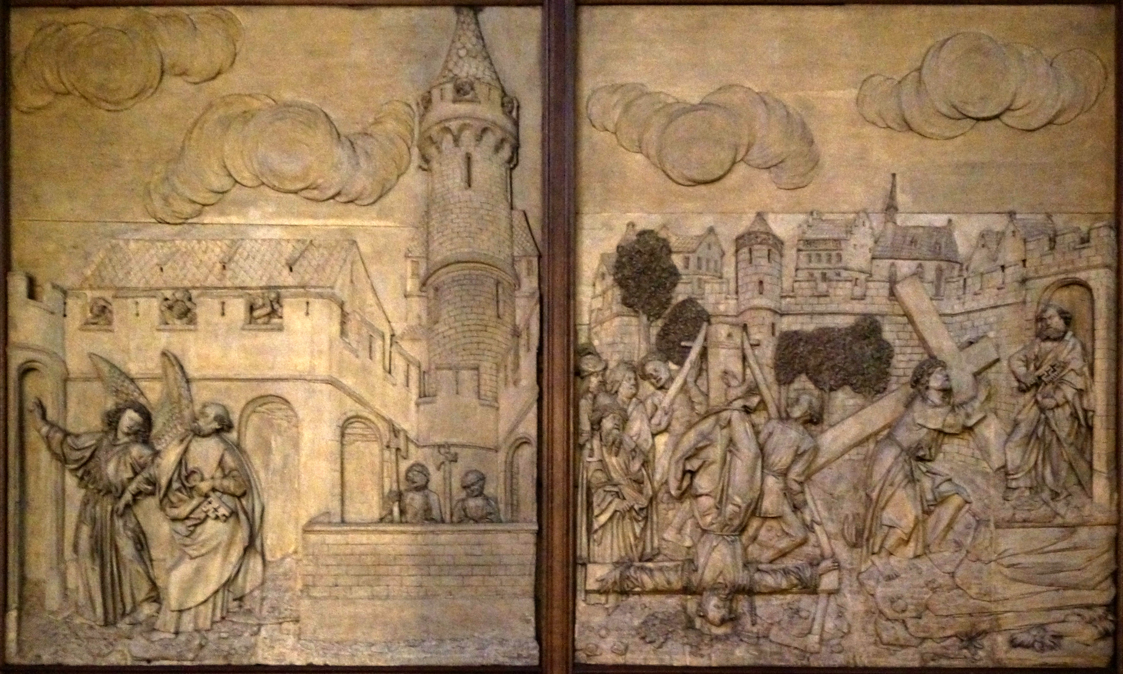 détail de Cycle de la Passion du Christ (St-Pierre-le-Vieux, Strasbourg).